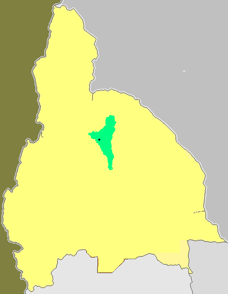 Mapa de la provincia de San Juan Argentina dode se observa un mancha verde, esa misma nos muestra la superficie que ocupa el oasis agrícola del Valle de Jáchal